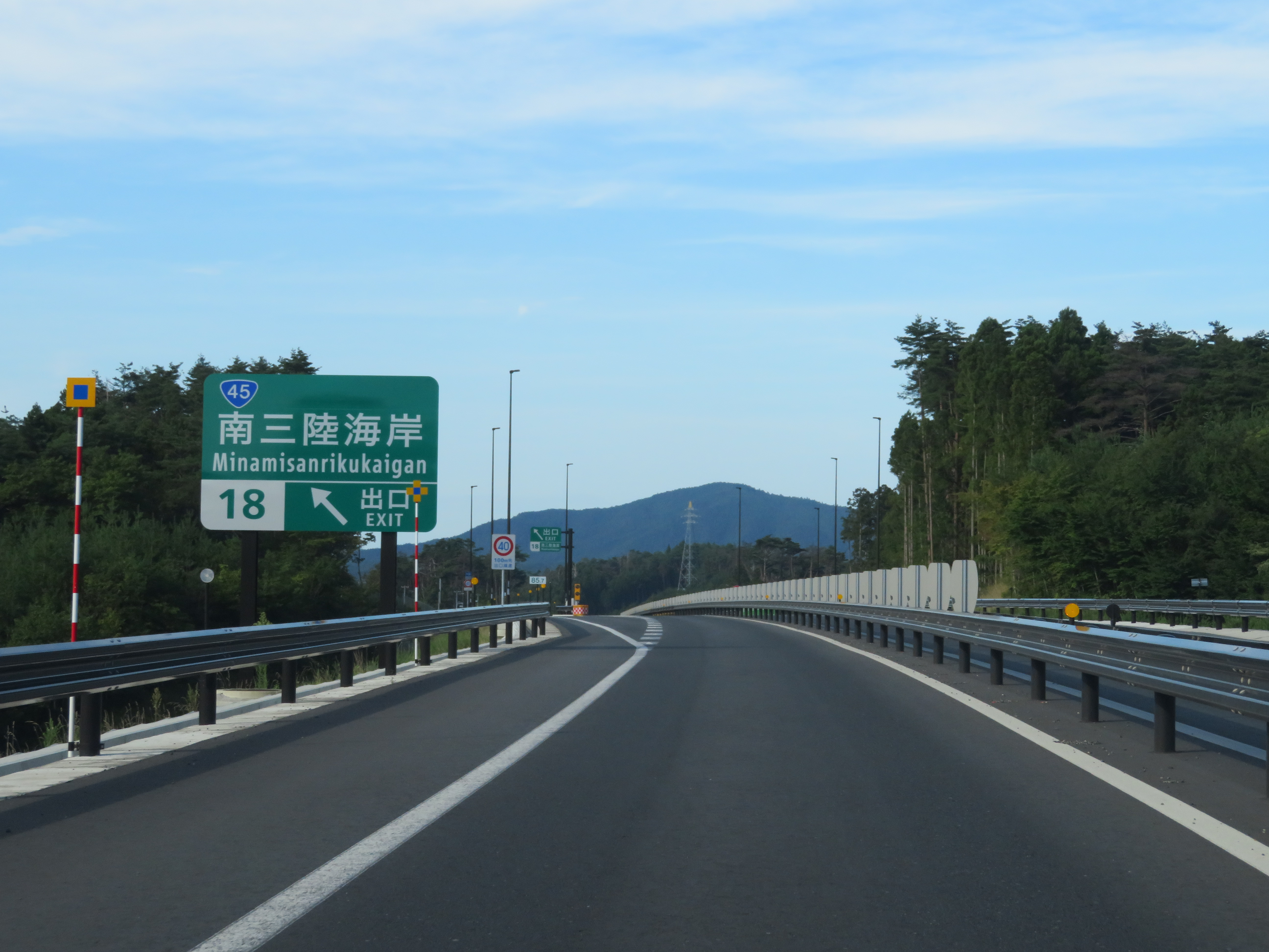 三陸自動車道（南三陸道路）南三陸海岸インターチェンジ出口付近（歌津方面側から撮影） !Canon PowerShot SX720 HS